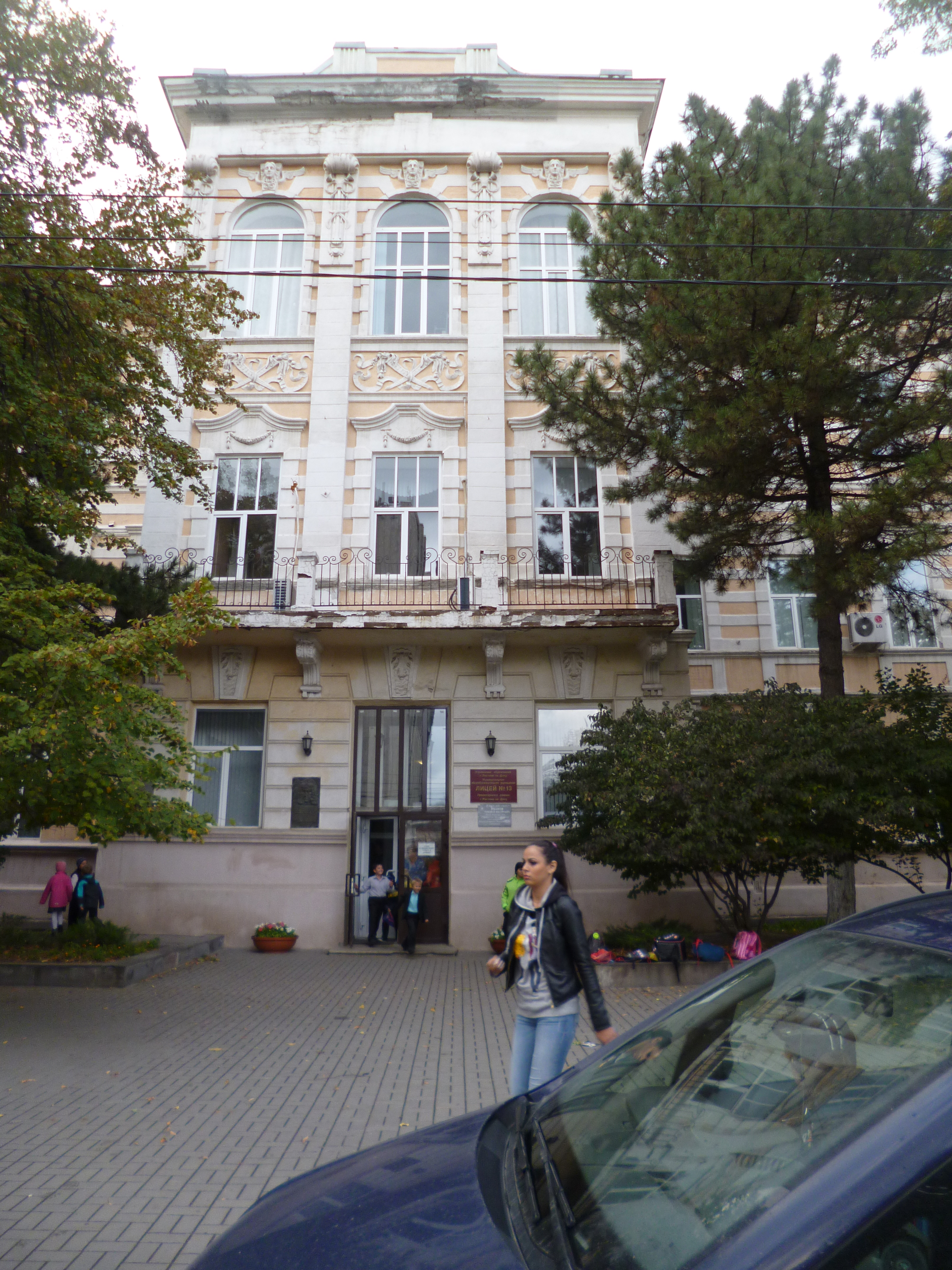 Здание екатерининской женской гимназии (Ростовская область, Ростов-на-Дону, свободы площадь, 1) Возведено в 1893 году по проекту архитектора Дурбаха Н.Н. Здание в хорошем состоянии, в нем работает лицей №13. Вид со стороны пл. К. Маркса